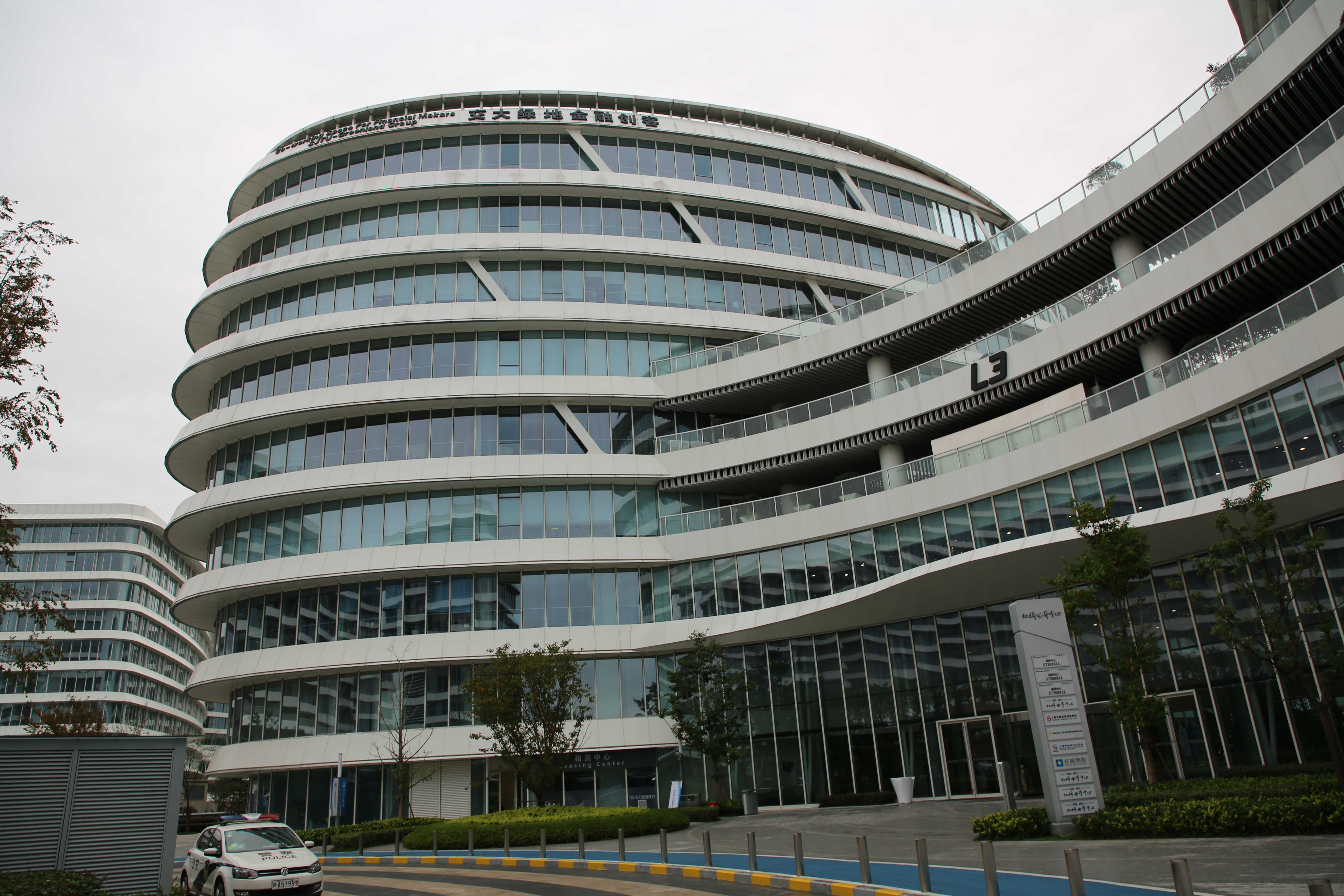 Shanghai. China